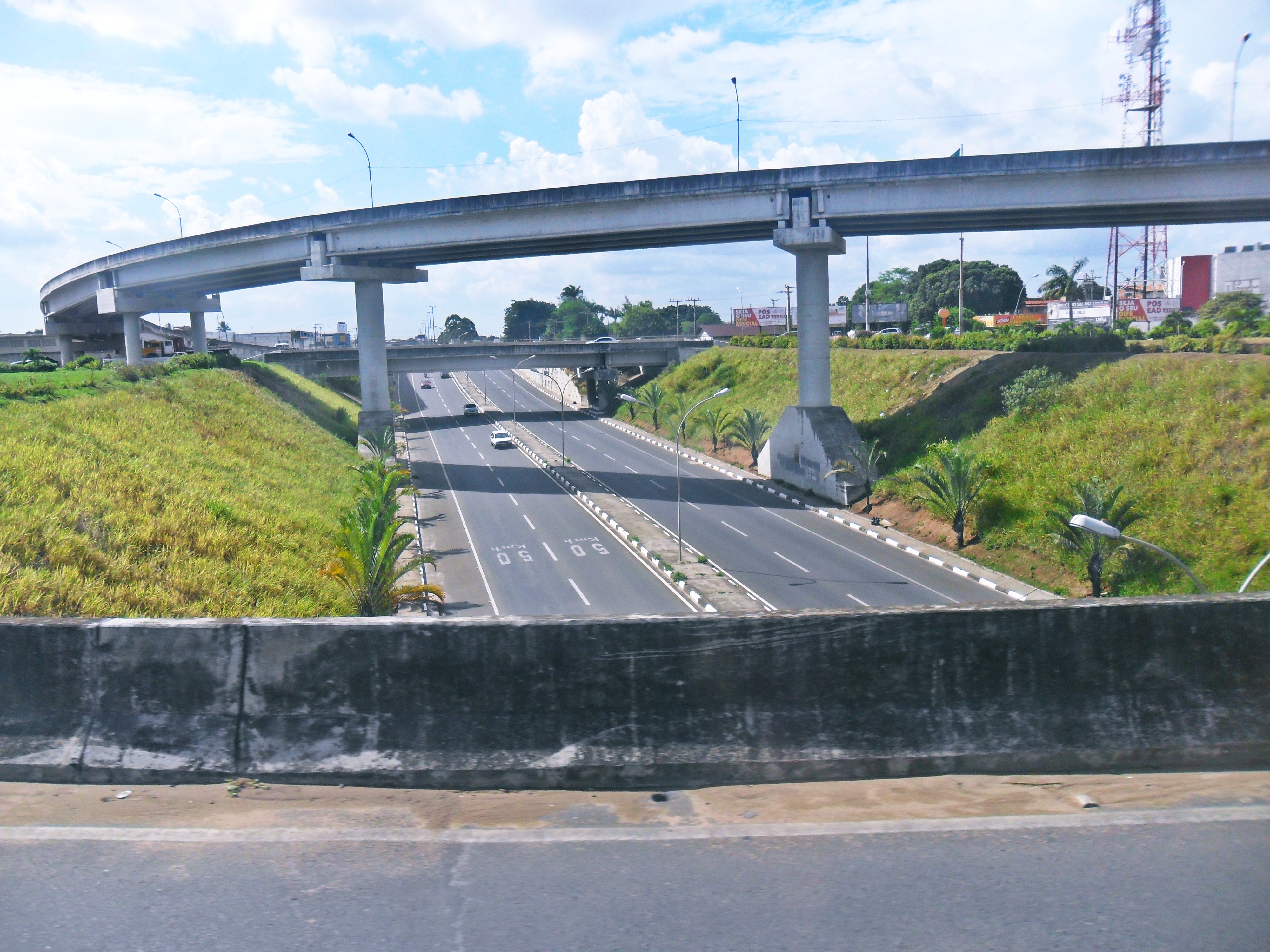 Viaduto da cidade nova feira